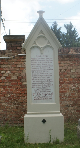 Wiener Zentralfriedhof-Johann Nepomuk Vogl